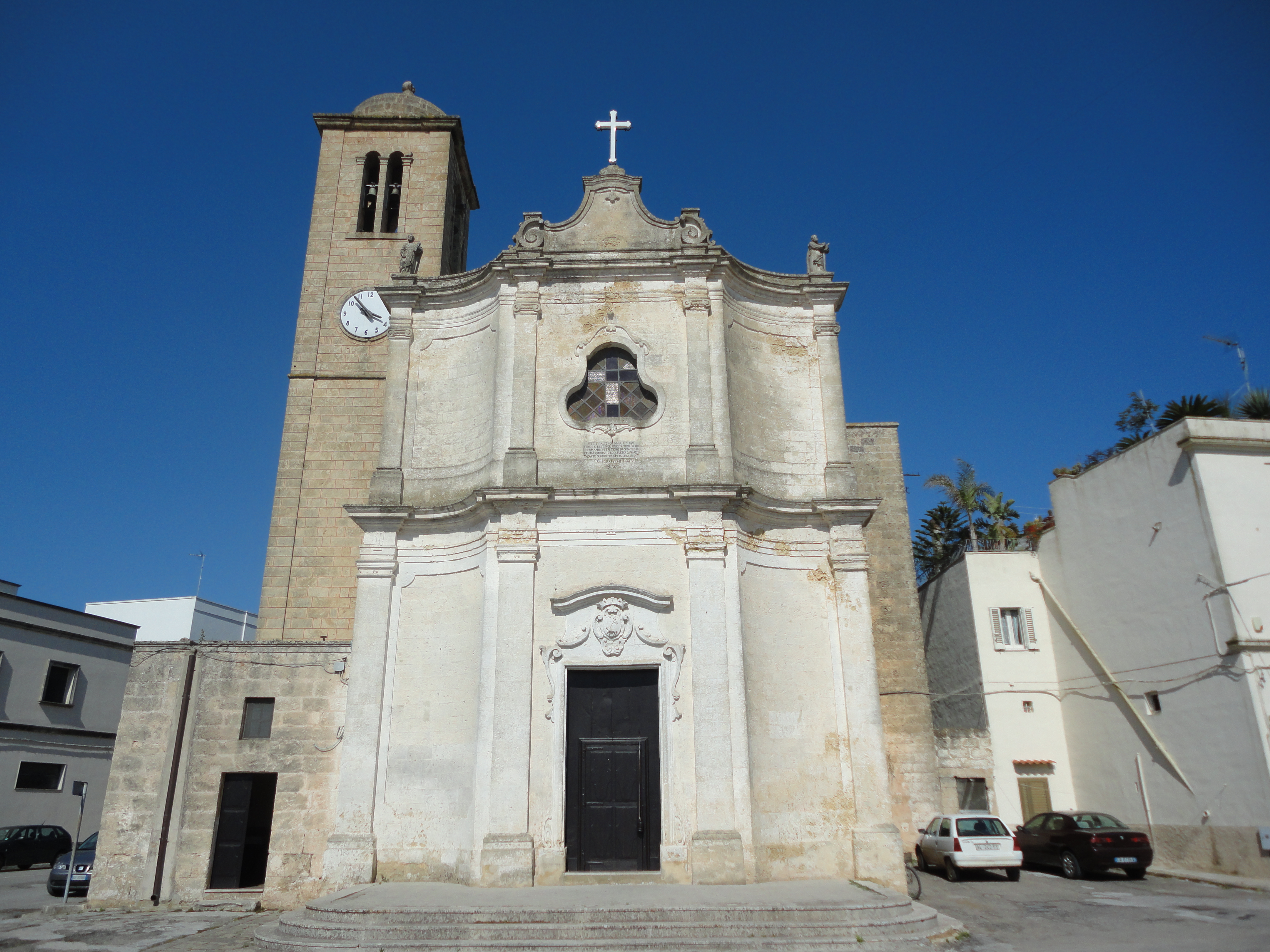 Chiesa di Sant'Andrea Caprarica di Tricase, Lecce